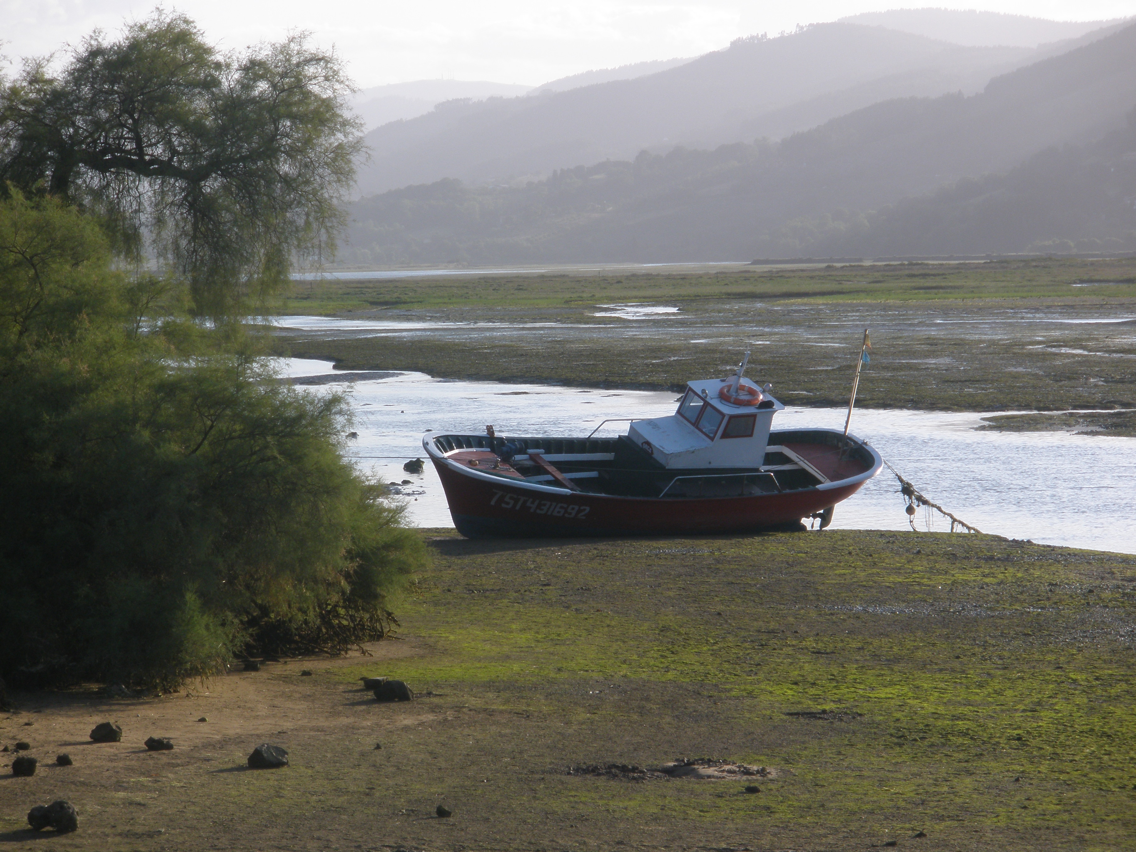 Ría de Villaviciosa This is a photography of a Special Area of Conservation in Spain with the ID: ES1200006. Natura2000 entry, EEA entry